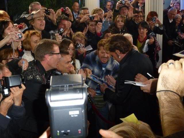 Johnny Hallyday signant des autographes à l'enregistrement de "Champs-Elysées"